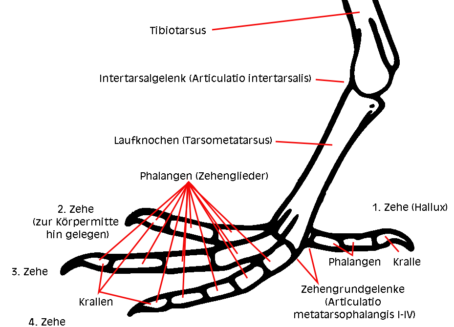 Skelett des Vogelfußes